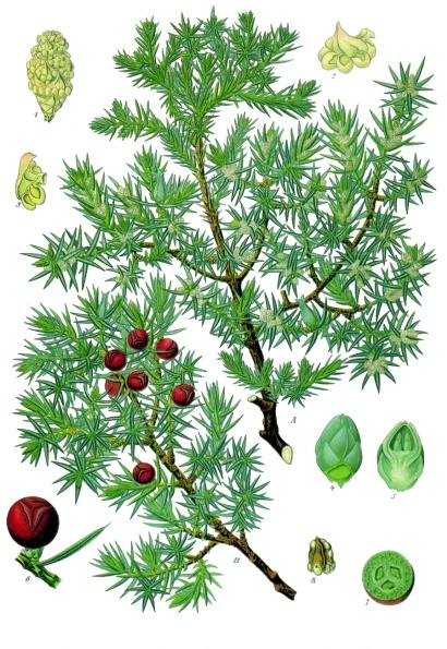 Zedern-Wacholder. A Zweig der blühenden männlichen Pflanze, daran zwei durch Insektenstiche erzeugte Gallen. B Zweig der blühenden und fruchttragenden weiblichen Pflanze. 1 männliches Kätzchen; 2 eine Schuppe von aussen mit aufgesprungenen Antheren; 3 dieselbe von der Achse aus gesehen; 4 weibliches Kätzchen; 5 dasselbe im Längsschnitt: 6 Frucht mit Stützblatt; 7 dieselbe im Querschnitt; 8 Samen mit Harzklümpchen A, B natürliche Grösse; 1 bis 8 vergrössert.